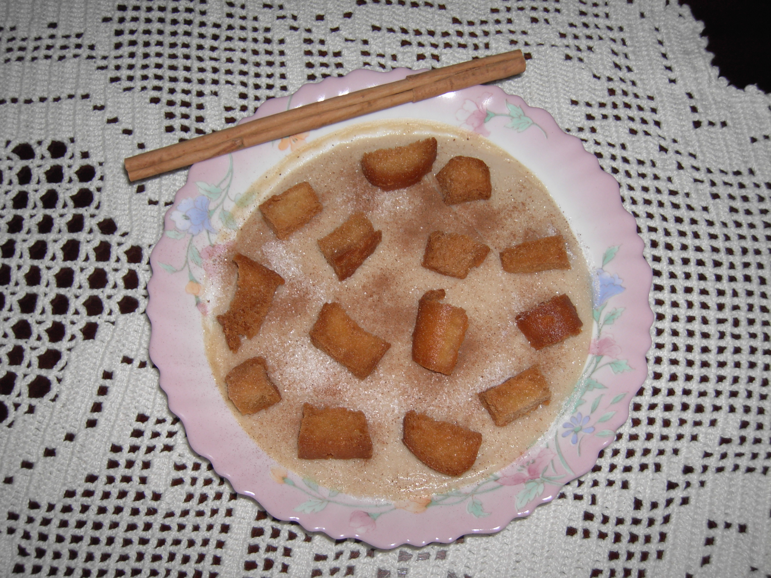 Gachas andaluzas, dessert